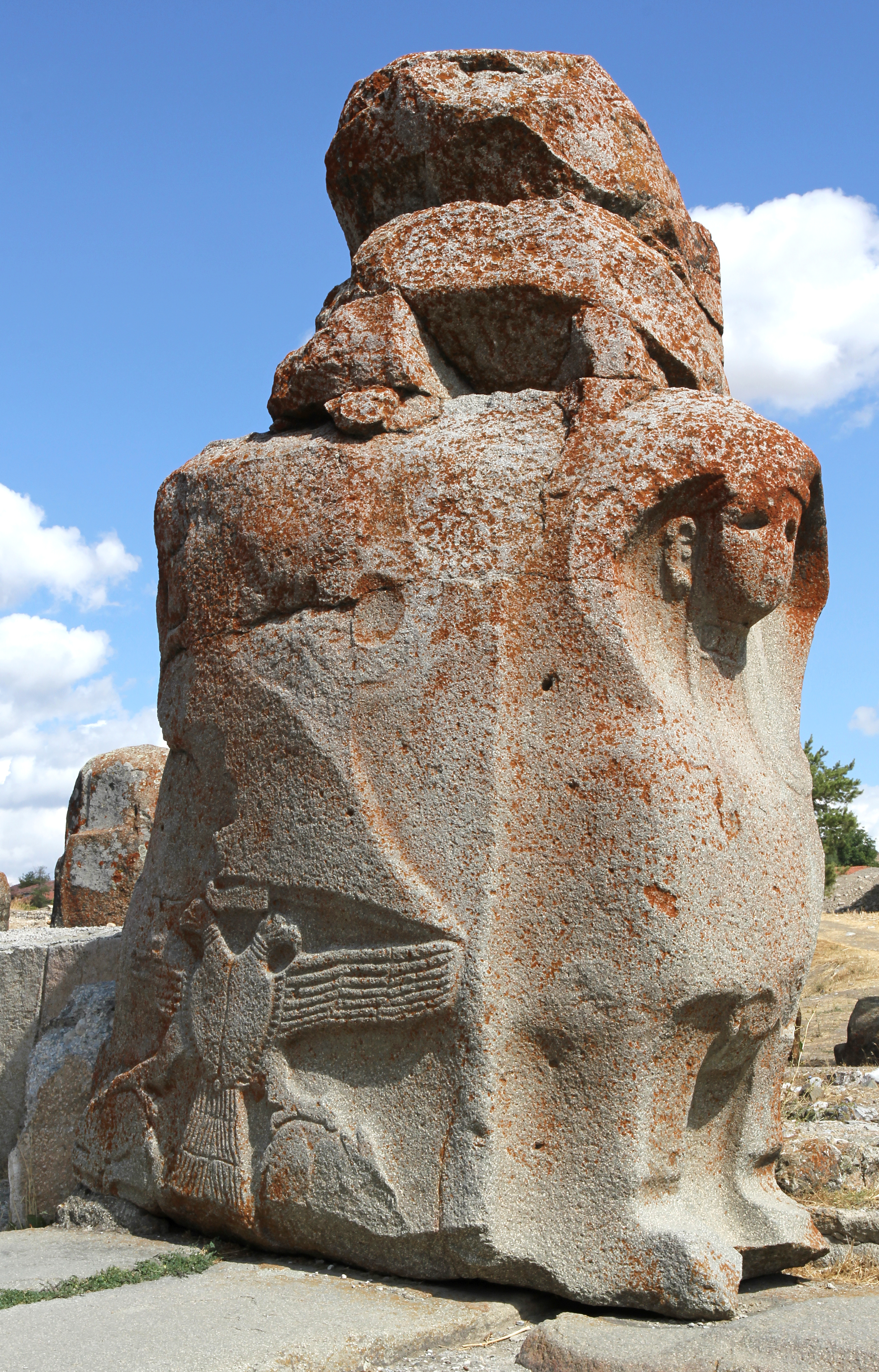 Alaca Höyük, Siedlungshügel in Zentralanatolien, Sphinxtor rechte Seite, Sphinx mit Königsrelief und Adler auf der Seite - Die Sphingen sind Repliken, die Originale stehen im Museum für anatolische Zivilisationen in Ankara